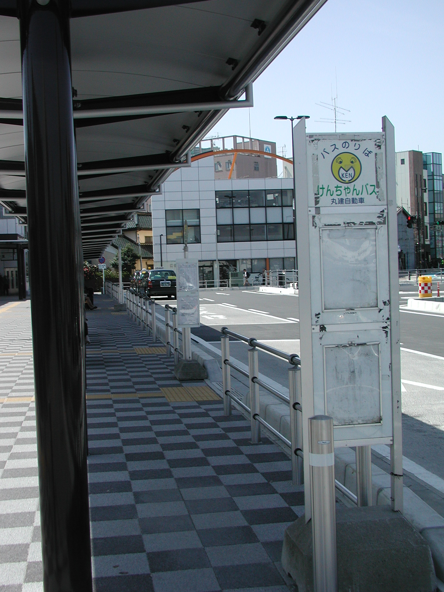 西口ロータリー内に移転完了した、けんちゃんバスの蓮田駅西口停留所。